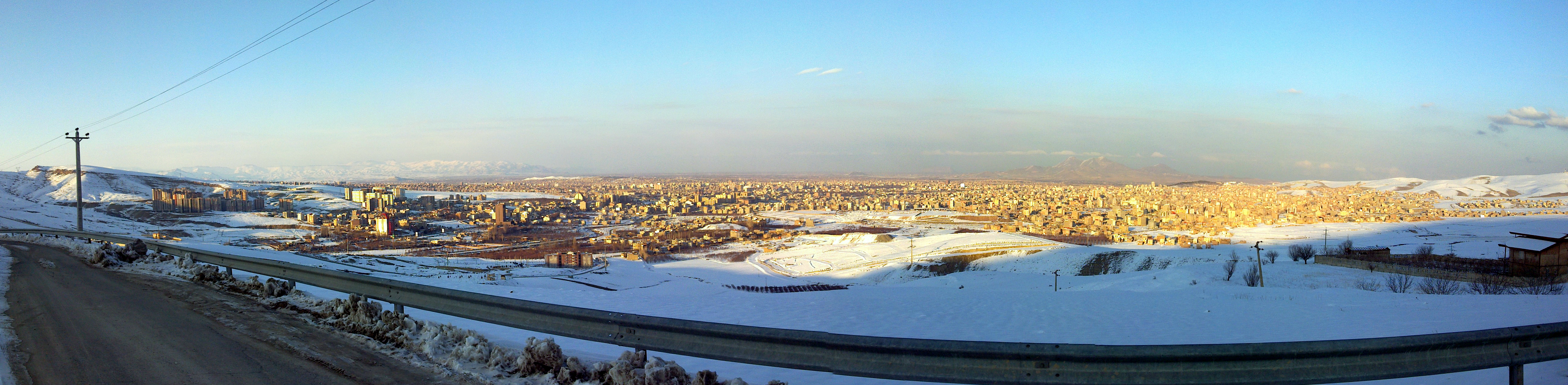 تۆرکجه: اورمو شهری سیر داغیندان